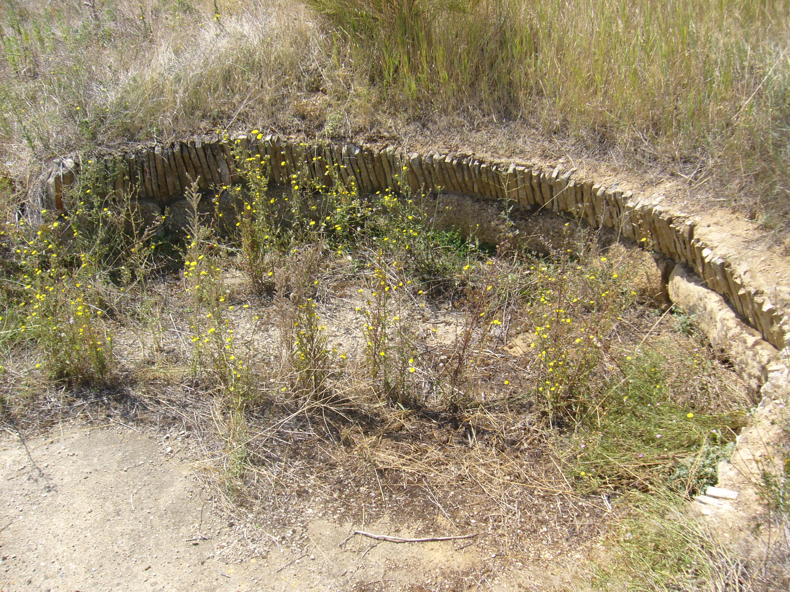 Yacimiento Neolítico de La Velilla, Osorno, Palencia, Castilla y León, España